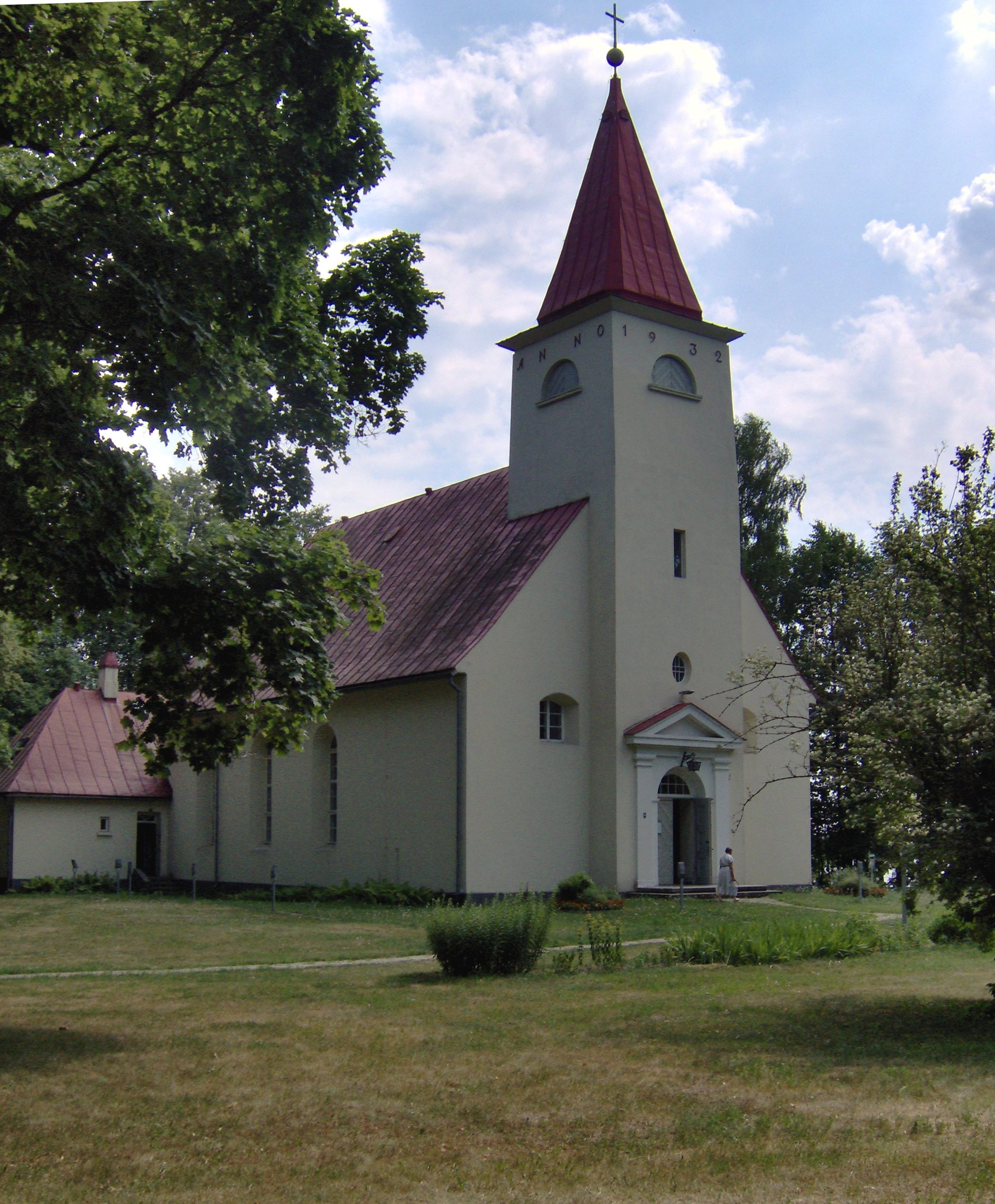 Lielvārdes luterāņu baznīca